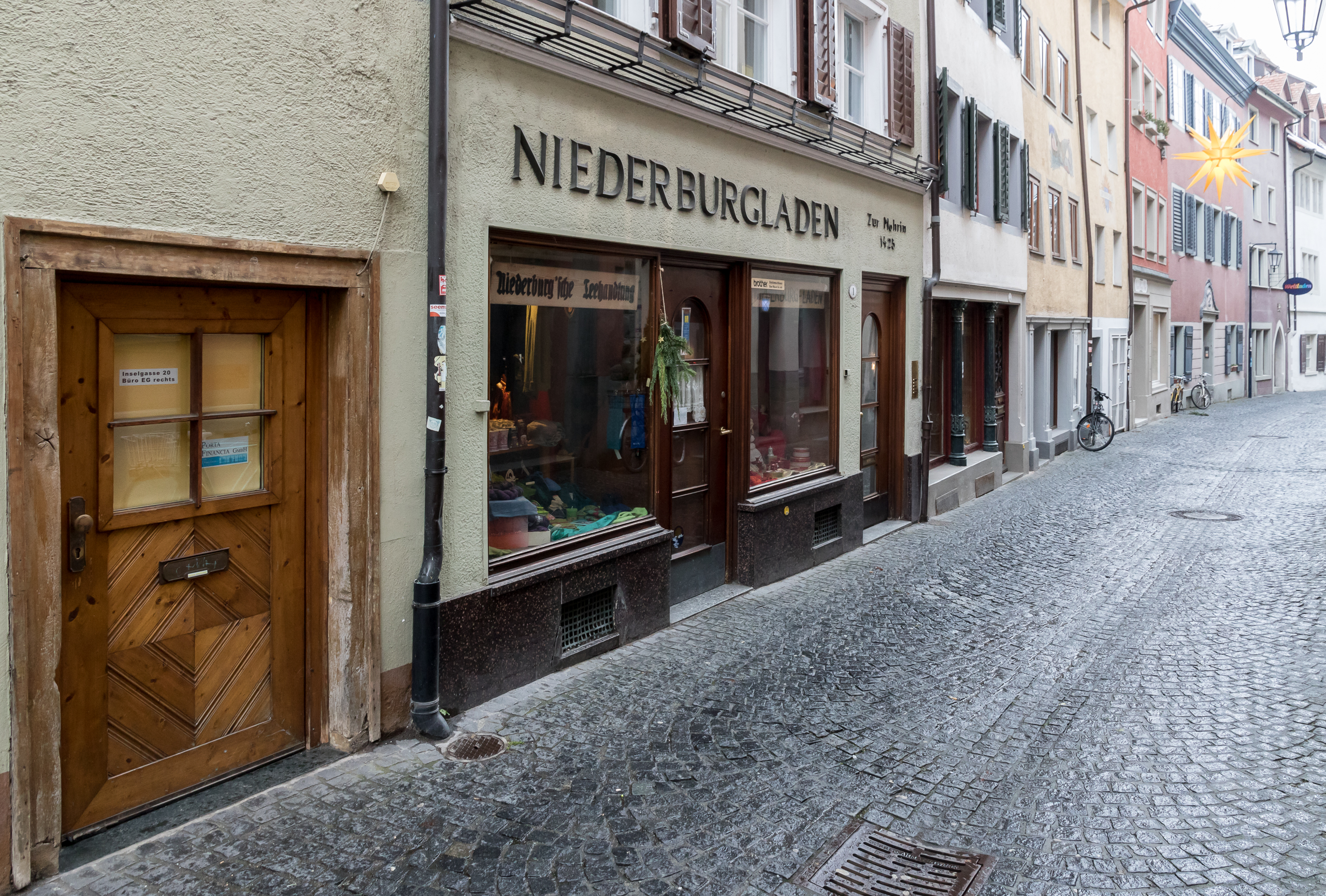 Rheingasse mit Niederburgladen in Konstanz